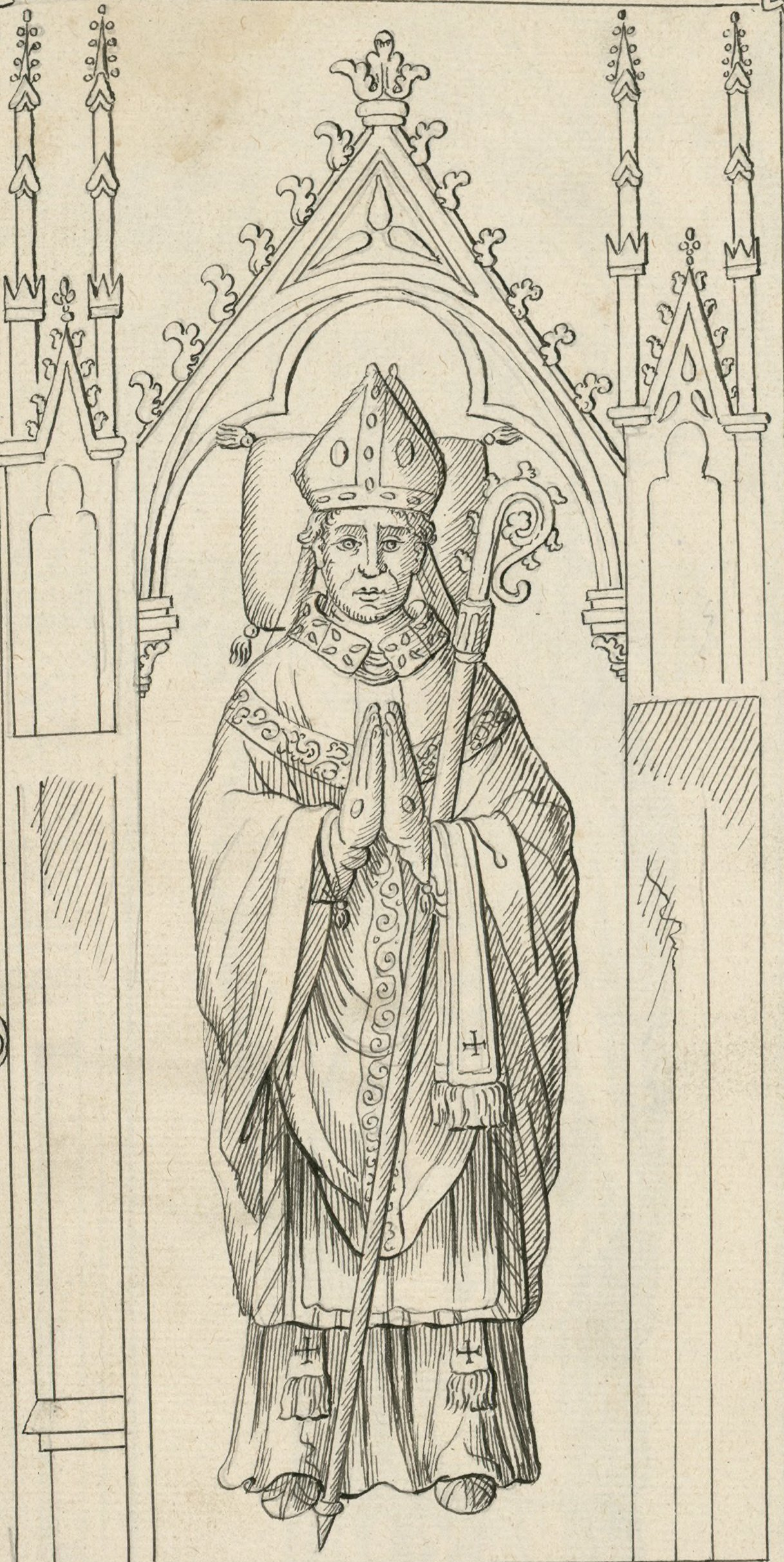 Pierre tombale sur laquelle est gravée l'effigie d'un prélat : Guillaume de Grez, évêque d'Auxerre